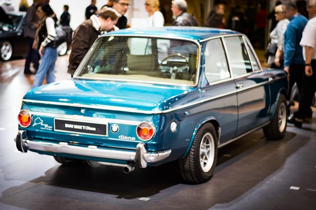 Einer der vier verbliebenen (bekannten) BMW 2002 ti Diana – hier in Türkis-metallic, aufgenommen anlässlich der Technoclassica 2016 in Essen.